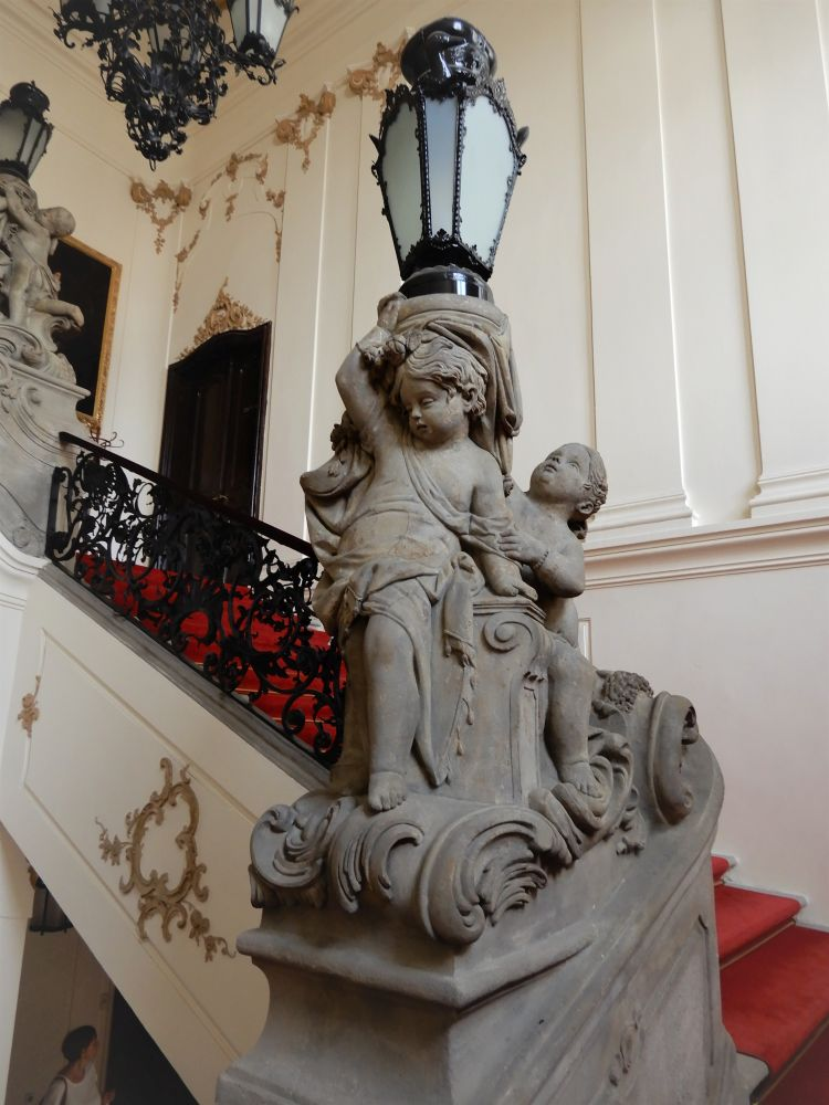 Arcibiskupský palác, schodiště z 1. do 2. patra, Platzerovy sochy světlonošů